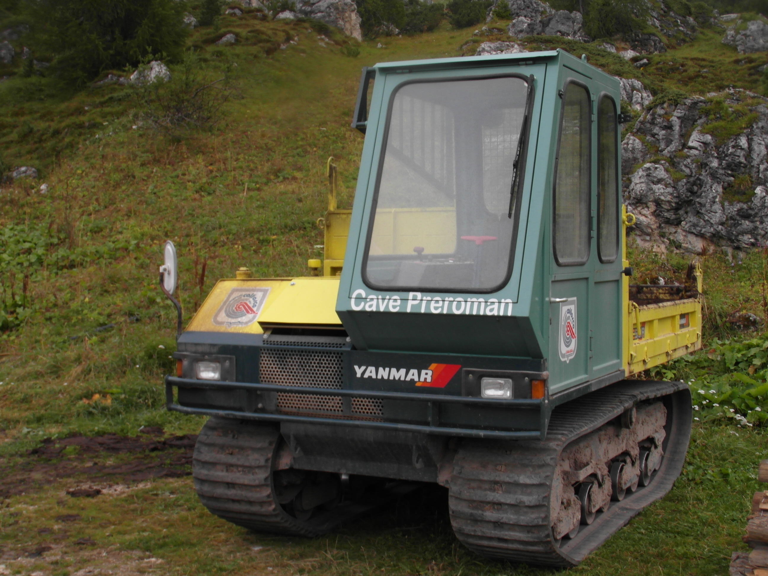 Yanmar presso il passo Falzarego